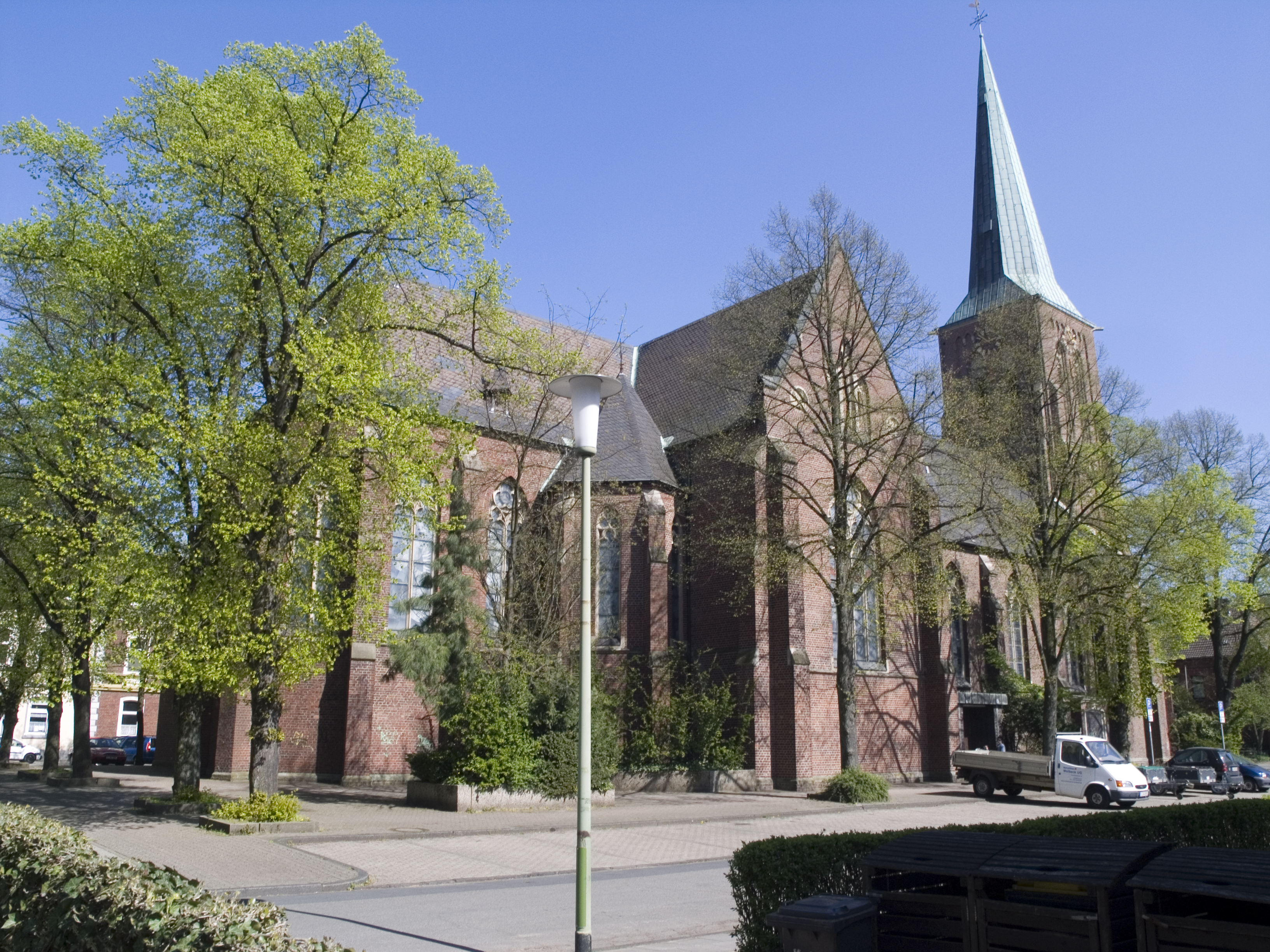 Северный Рейн - Вестфалия, Эссен - церковь Святого Иосифа во Фринтропе